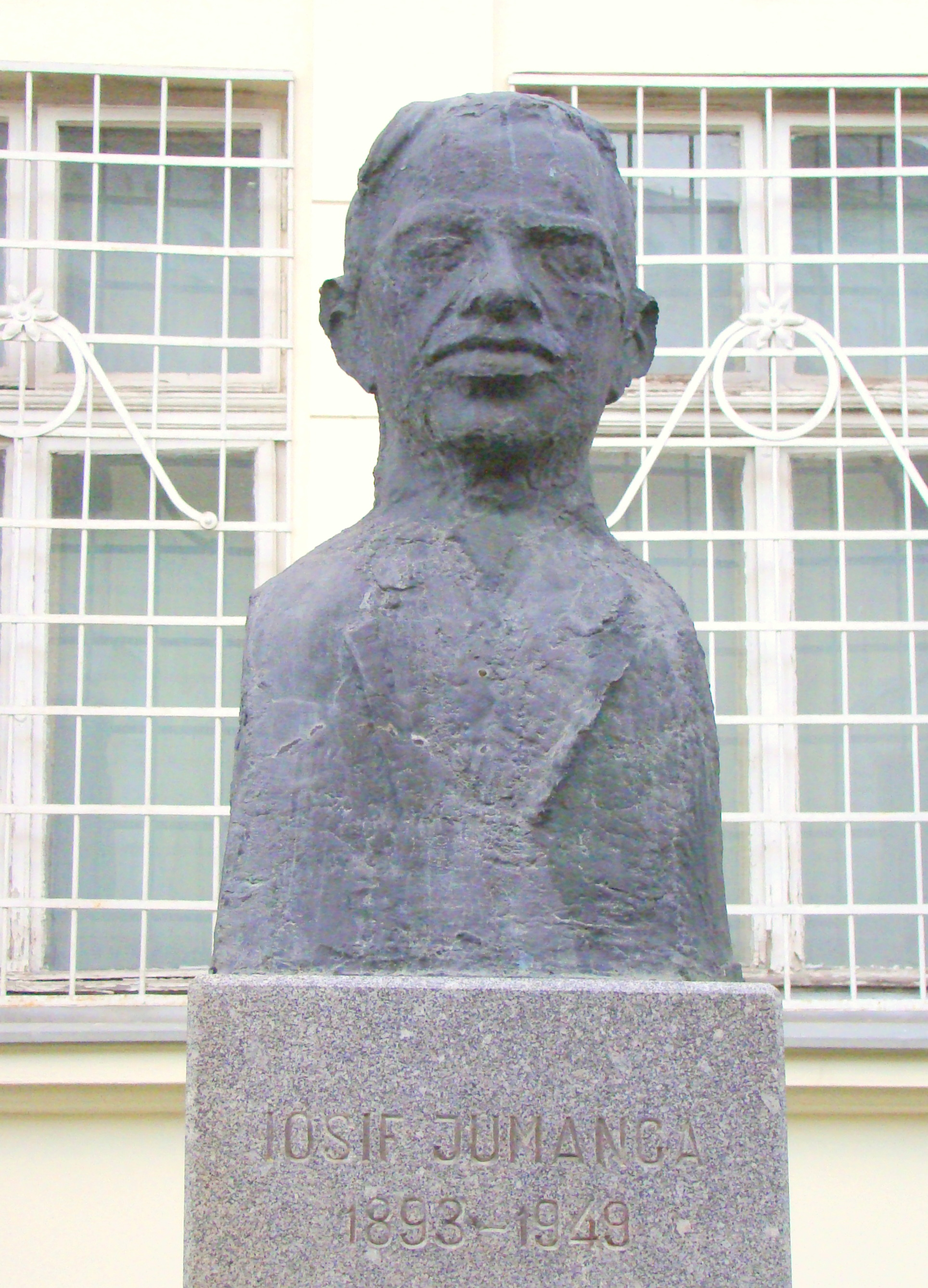 Bustul lui Iosif Jumanca din Alba Iulia